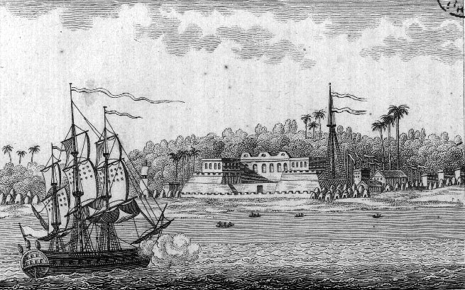 Vue de l'ile Saint-Louis du Sénégal prise du côté de la mer (illustration de L'Afrique ou histoire, moeurs, usages et coutumes des Africains, de René Claude Geoffroy de Villeneuve)